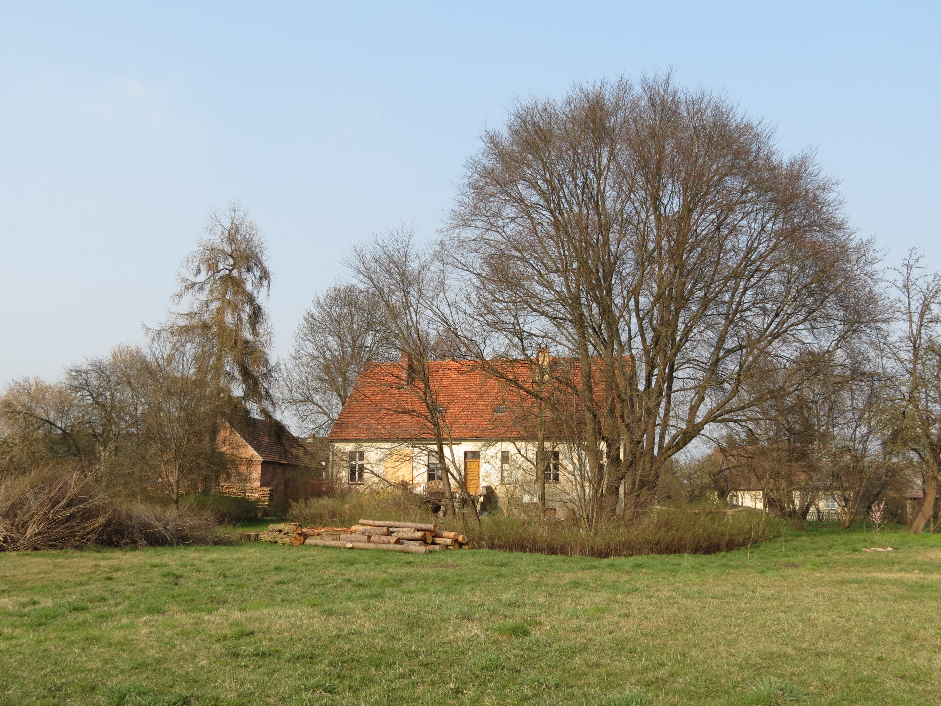 Schulgebäude, Trebitz, Ortsteil der Stadt Lieberose, Lkr. Dahme-Spreewald, Brandenburg, Deutschland